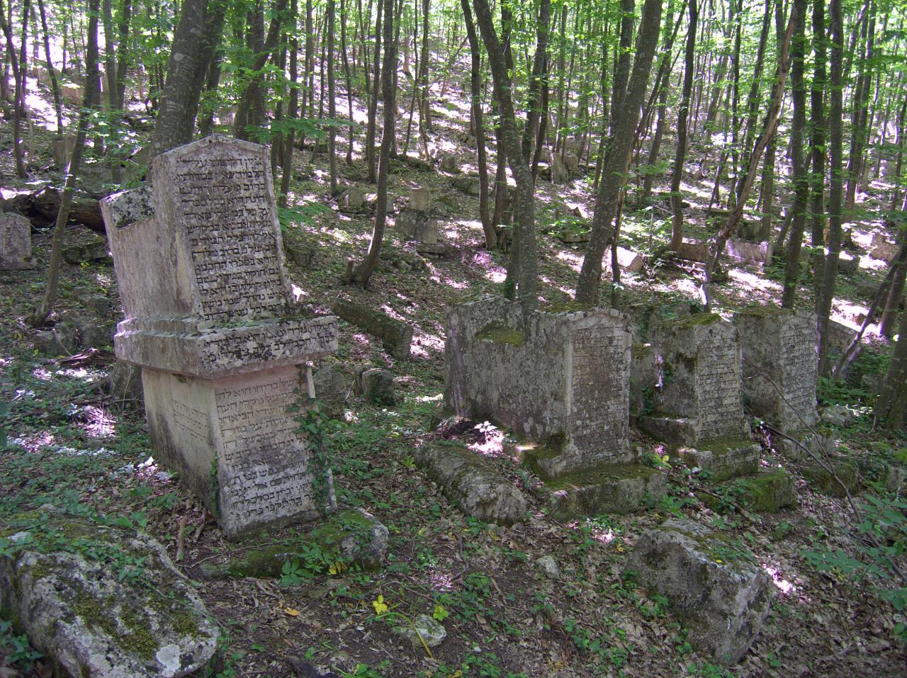 Надгробия на караимском родовом кладбище Балта-Тийме